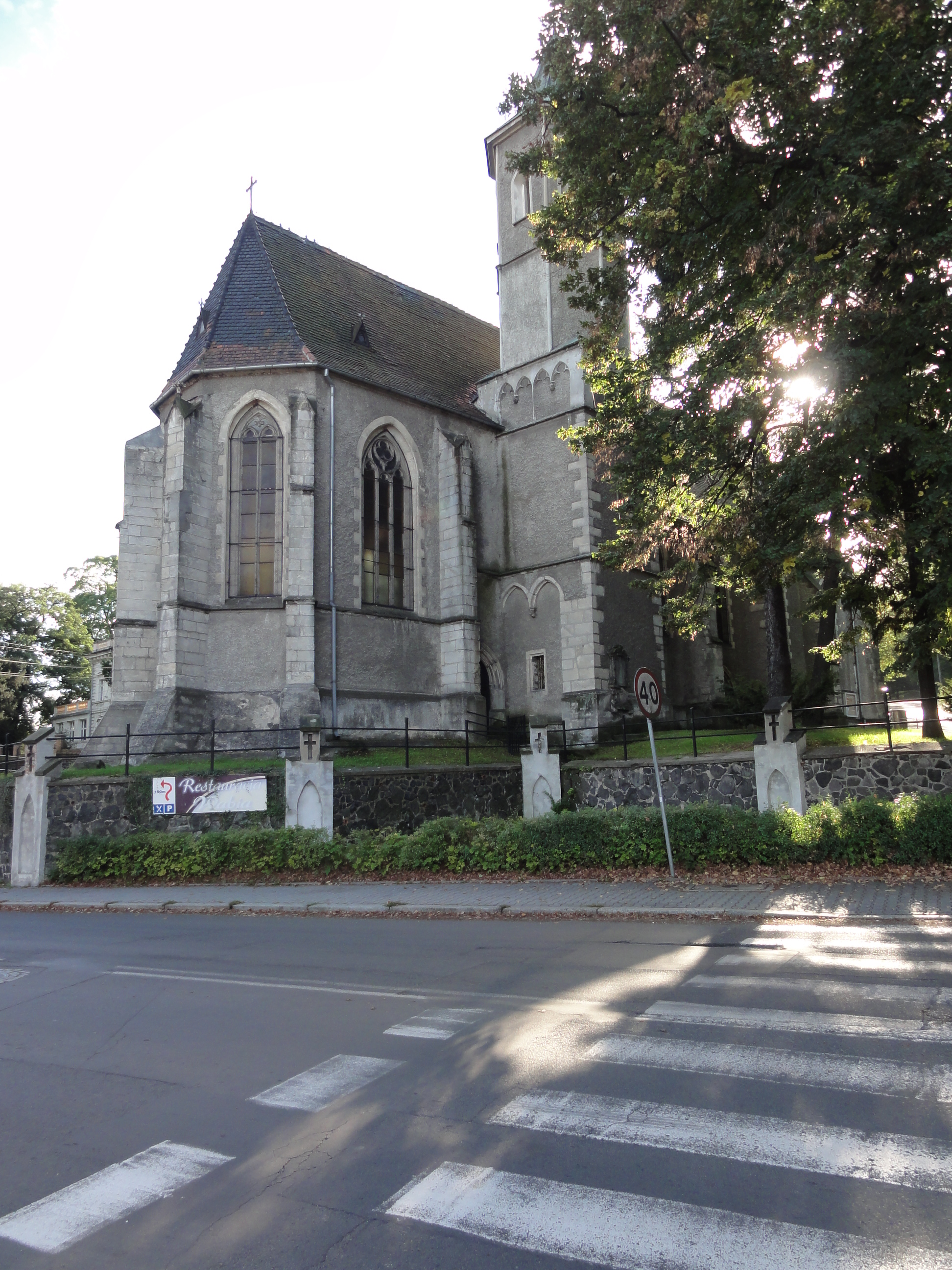 Lubań, Al. Kombatantów 2 - pierwotnie kościół rzymskokatolicki, obecnie ewangelicko-augsburski p.w. Marii Panny, 2 poł. XIV, XIX